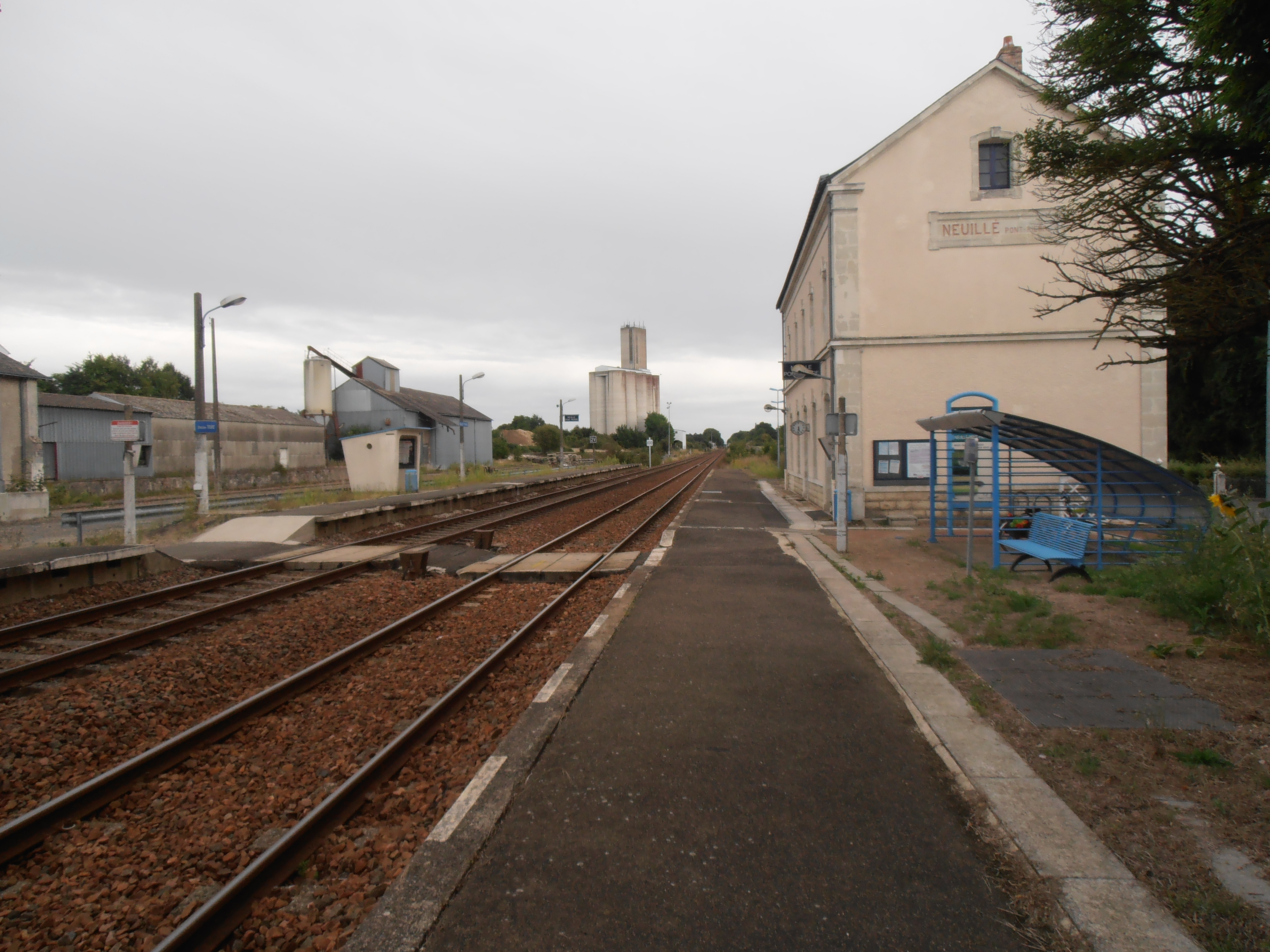 Le bâtiment de la gare, les voies, les aubettes et le parc à vélo couvert. Vue en direction de Tours.